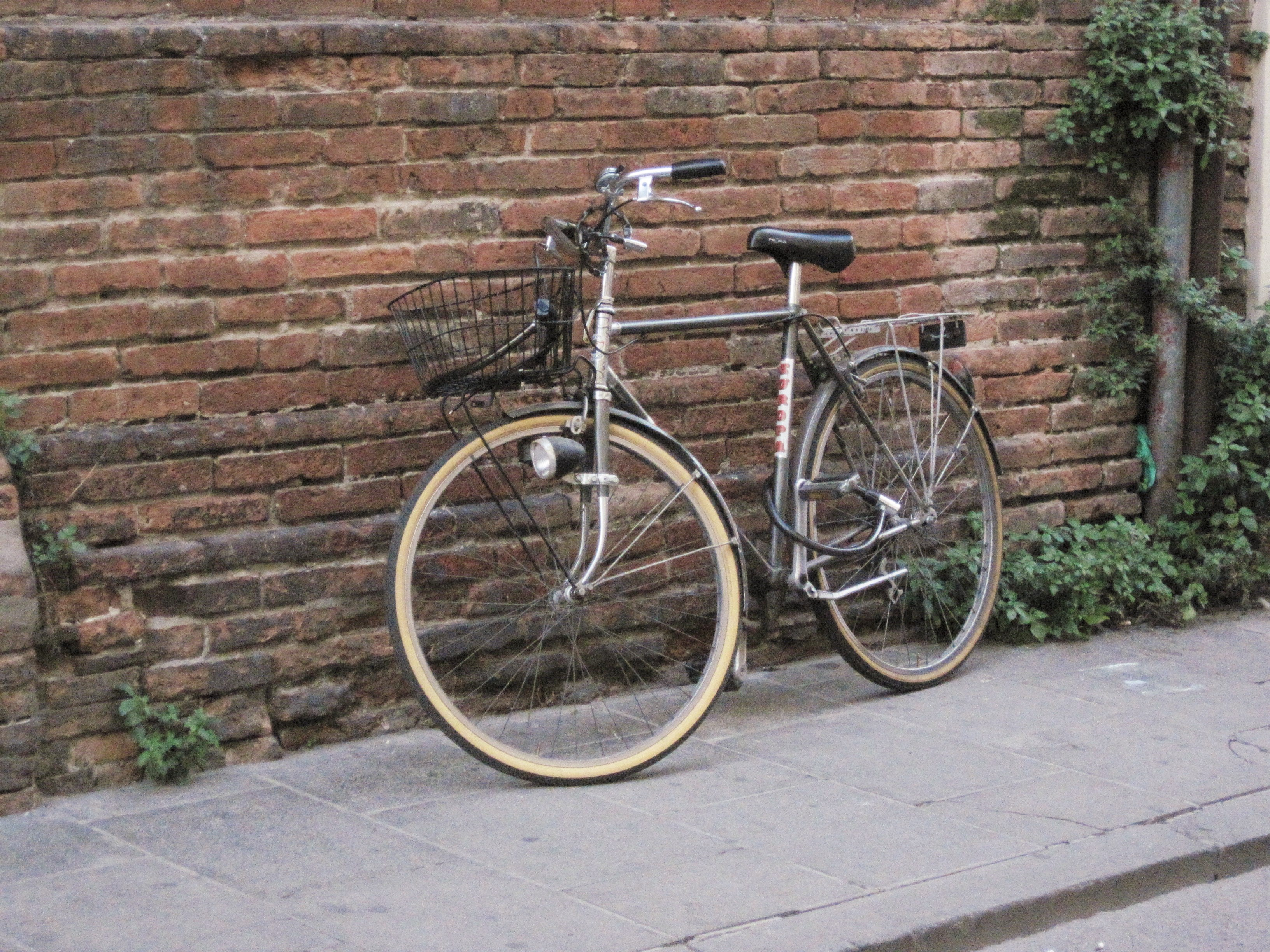 Ferrara è la città delle biciclette. Nel 1995 aderisce alla rete europea Cities for Cyclists e nel 1996 presso l’Assessorato all’Ambiente si costituisce l’Ufficio Biciclette